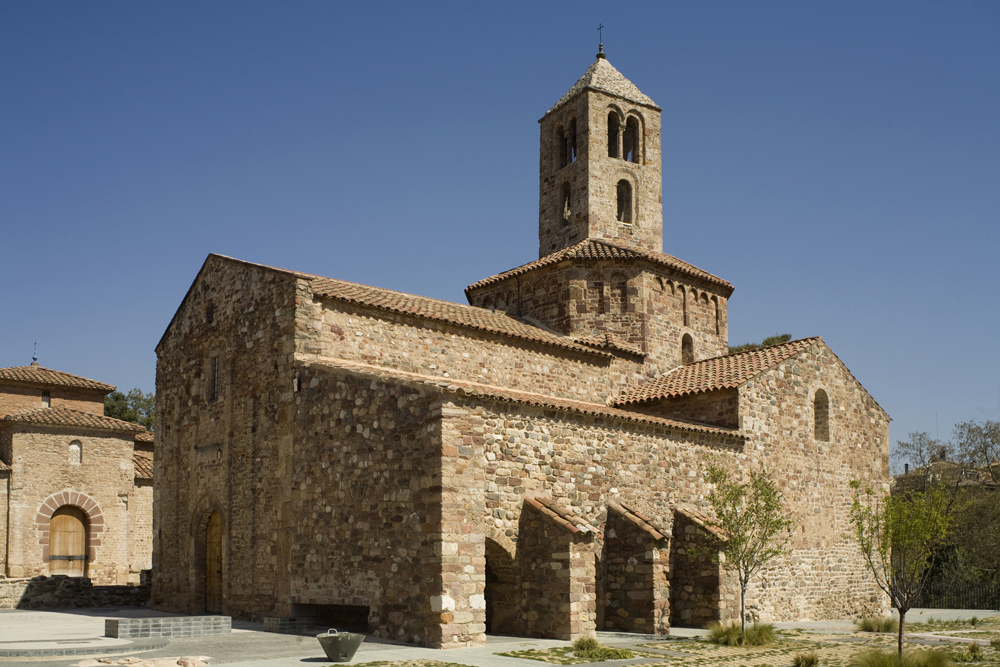 Cultural Heritage Spain